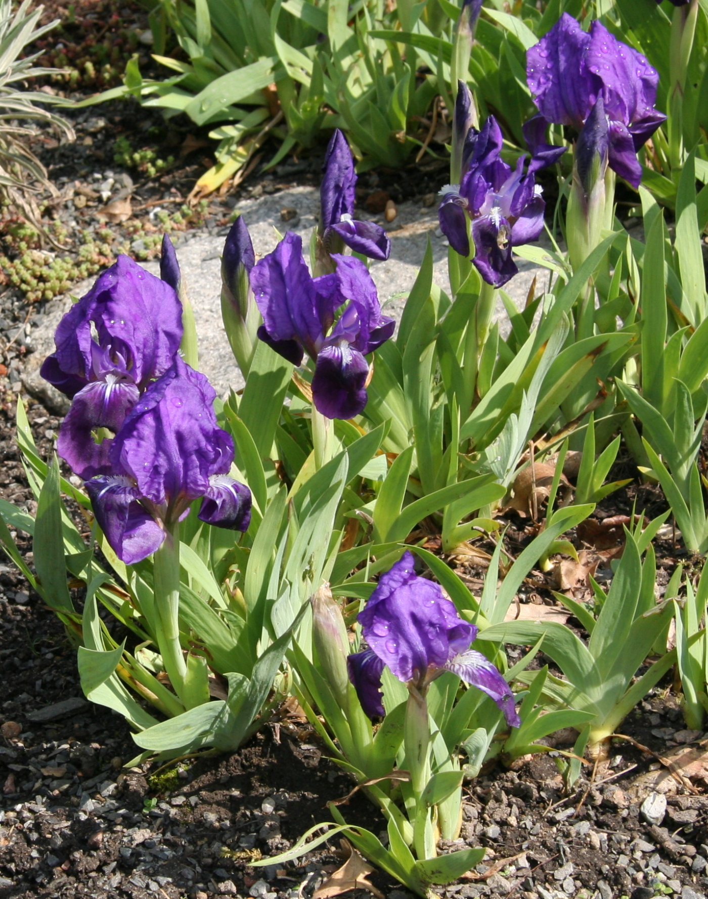 Iris subbiflora im Botanischen Garten Dresden